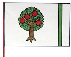 Vlajka obce Šenov u Nového Jičína.